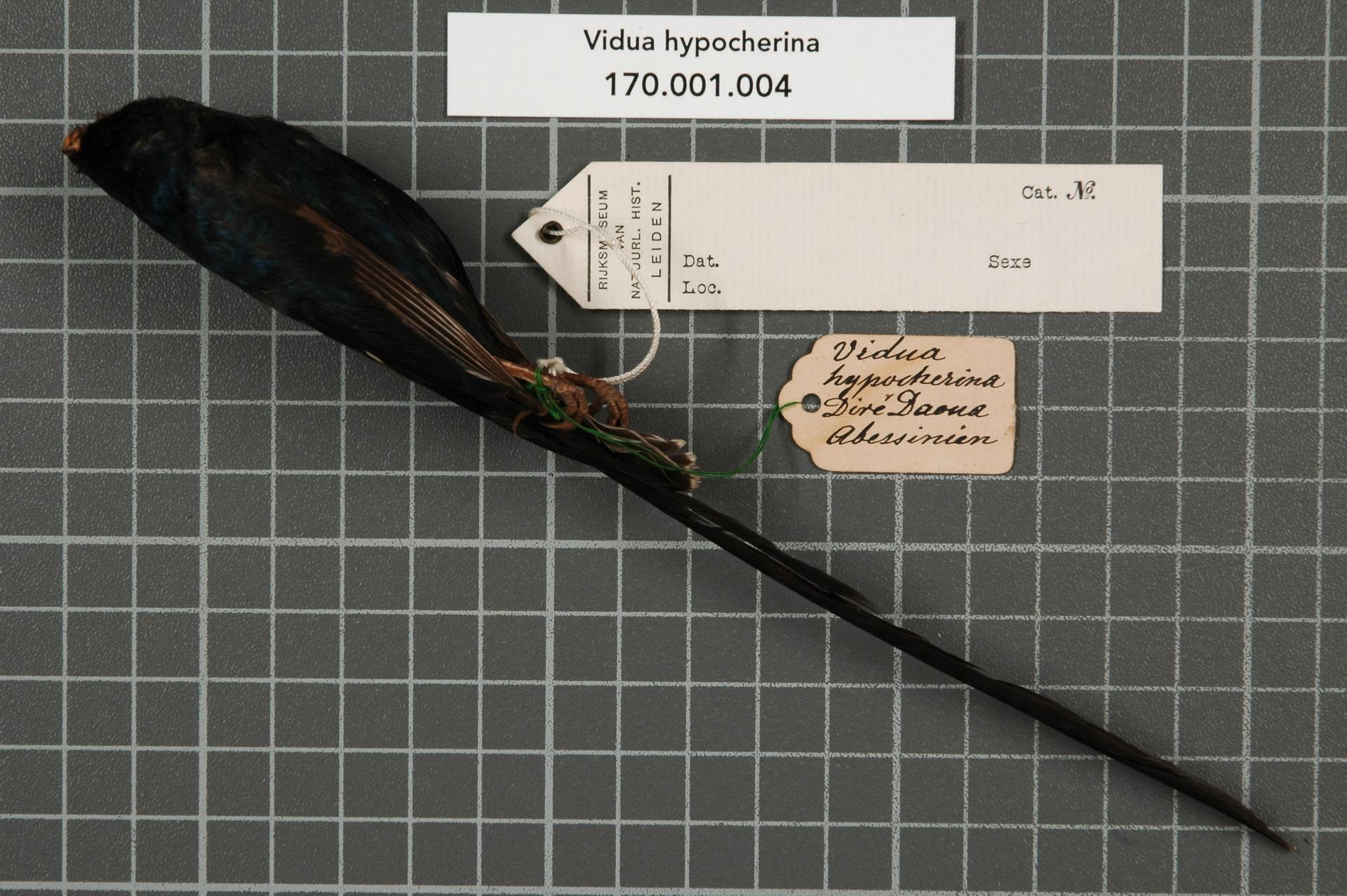 Presua hypocherina J. & E. Verreaux, 1856